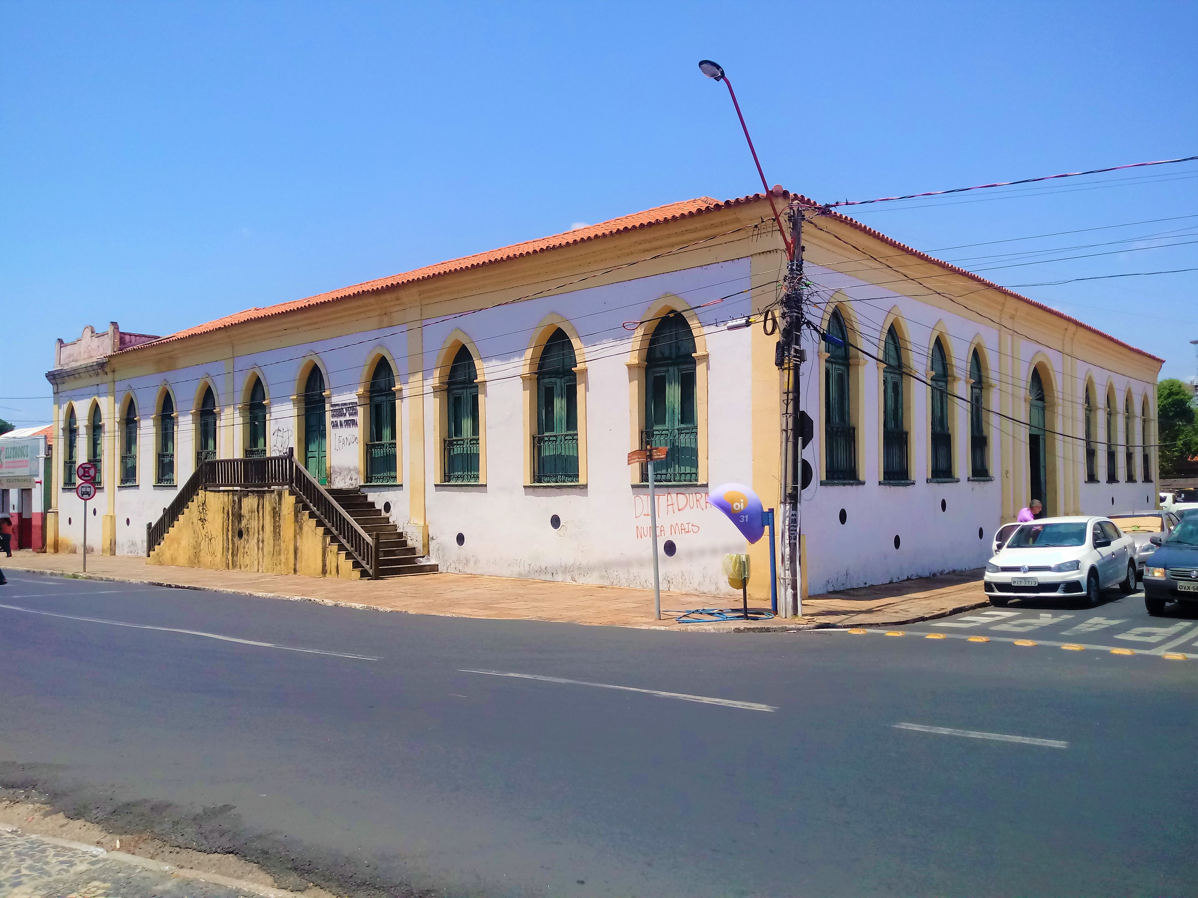 Vista externa da Casa da Cultura de Teresina.